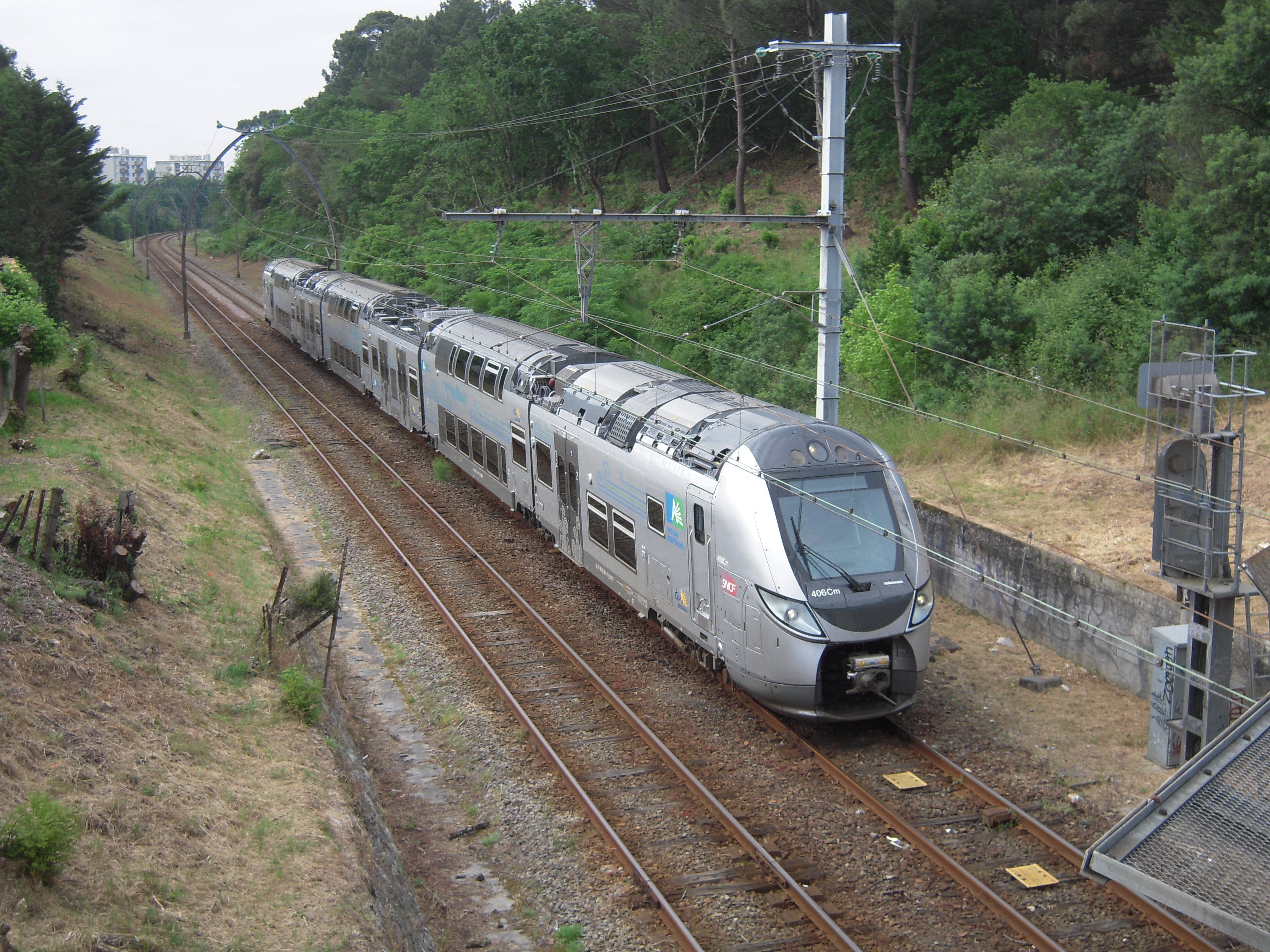 TER Aquitaine : 24 rames courtes, adaptées Midi, ont été commandées par la Région.